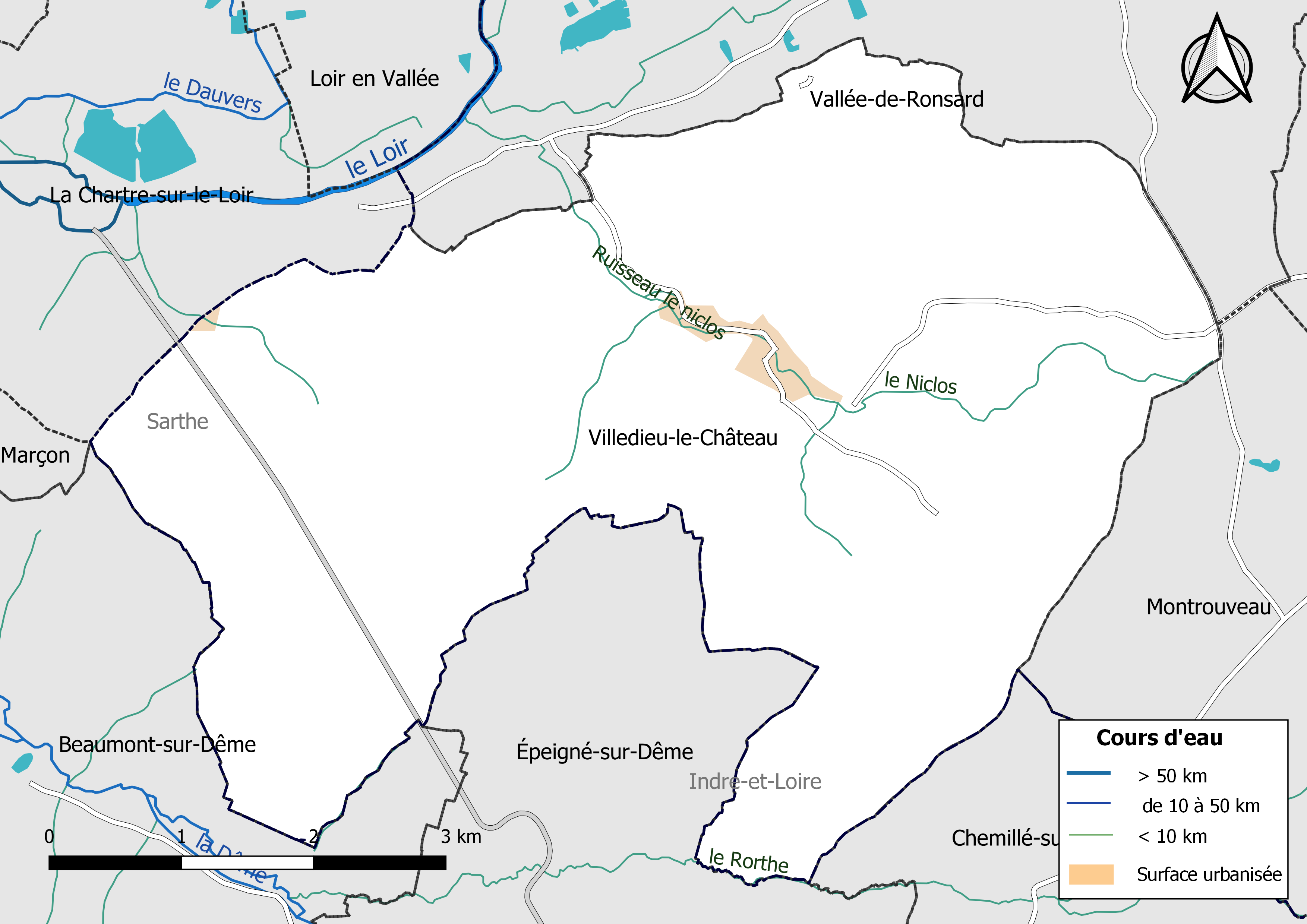 Carte du réseau hydrographique de la commune de Villedieu-le-Château (Loir-et-Cher, France).